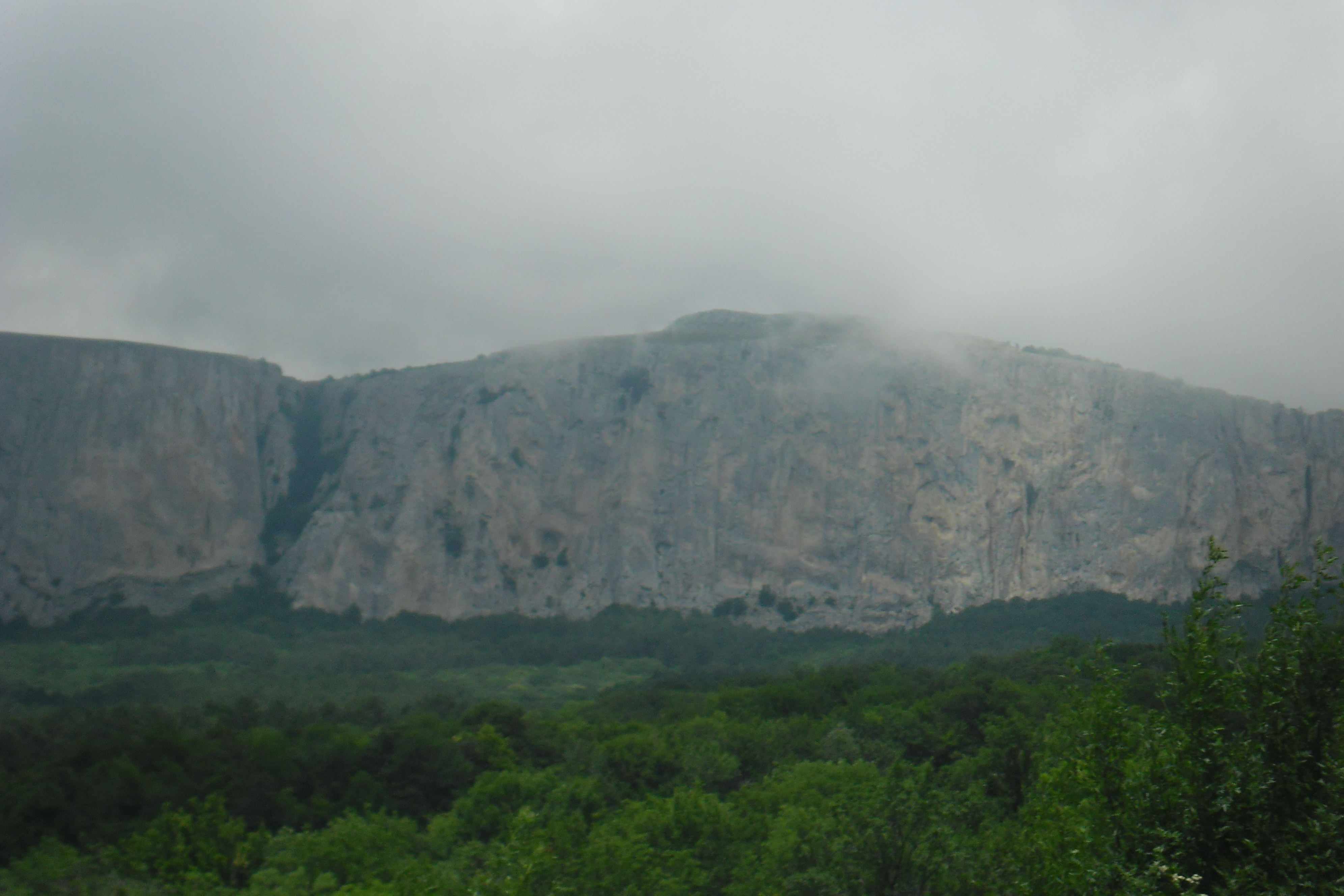 Фото